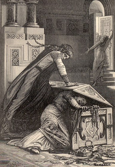 Frédégonde l'étranglait contre la planche inférieure. Fredegund tries to kill her daughter Rigunth.